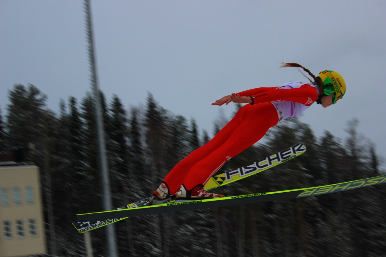 Наташа Соловьева на Чемпионате России в Нижнем Тагиле